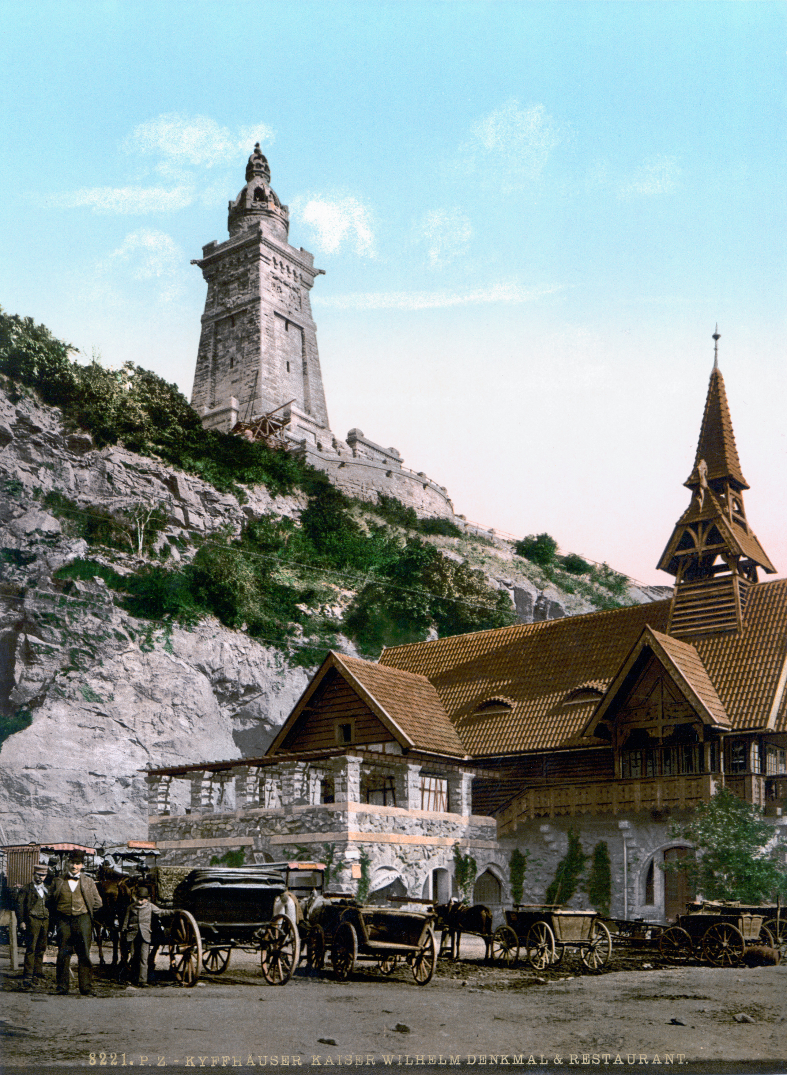 Kyffhäuserdenkmal um 1900